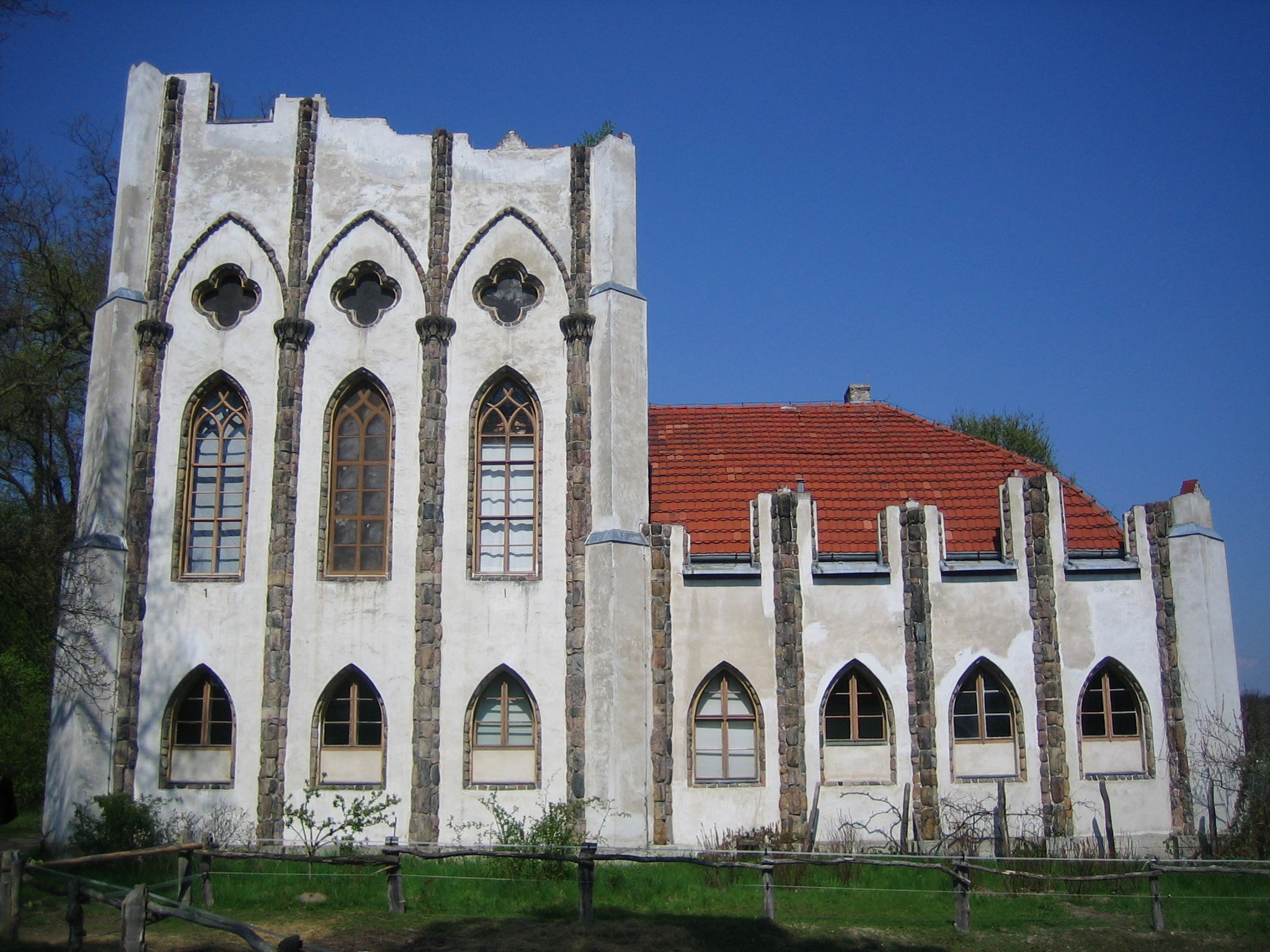 Meierei auf der Pfaueninsel in Berlin, Ansicht von Südosten